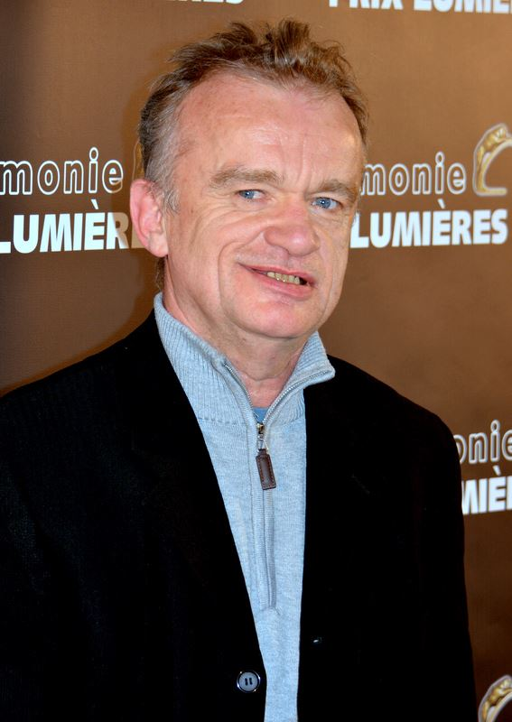 Dominique Pinon à la cérémonie des prix Lumières